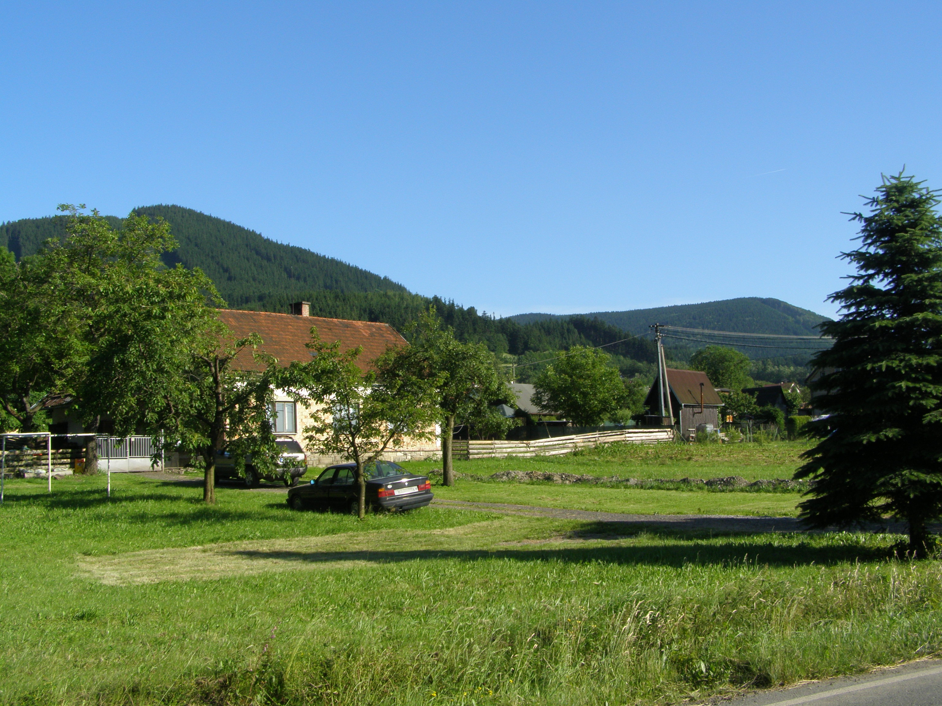 Česky: Lhotka, domy, v pozadí masiv Ondřejníku